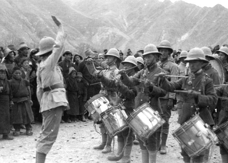 Lhasa, die Neujahrsparade des modernen Militärs vor dem Potala